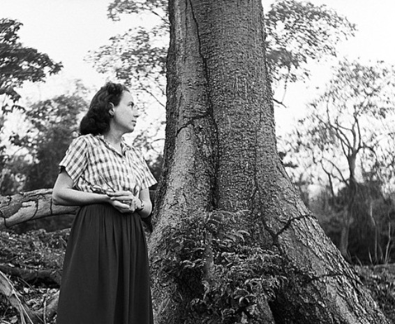 La poeta venezolana Elizabeth Schön (1921-2007).